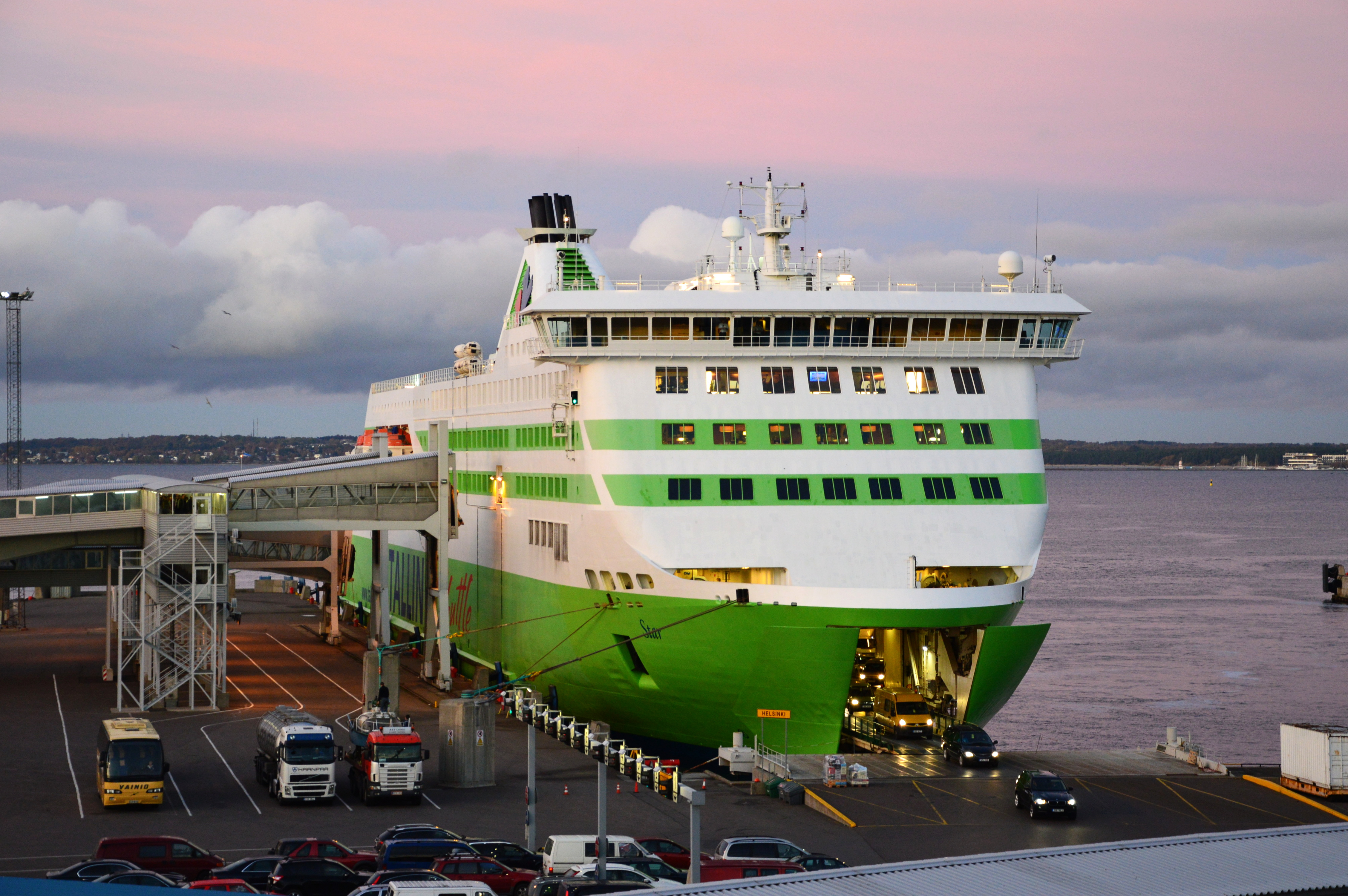 Star Tallinna sadamas 2013. aastal. Pildistatud Portuse hotelli katuselt.